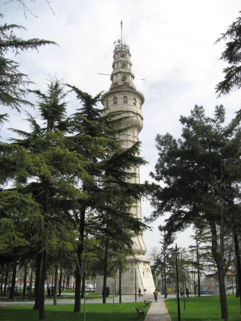 Beyazıt Tower